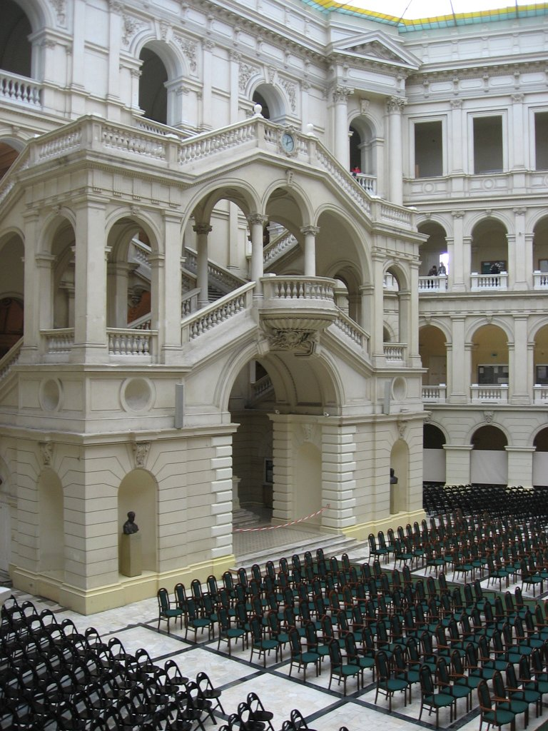 Politechnika Warszawska – Duża Aula.